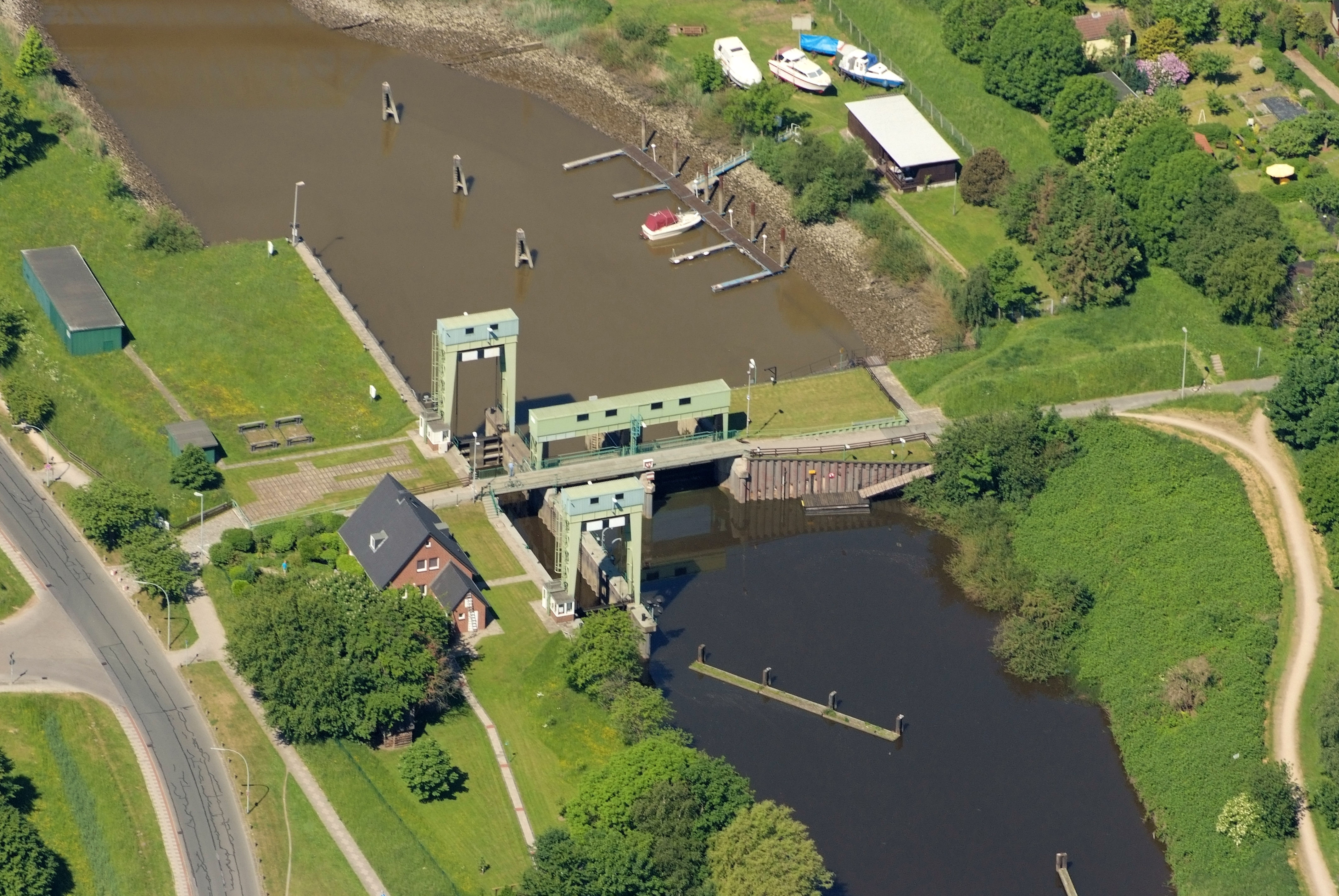 Fotoflug vom Flugplatz Nordholz-Spieka über Cuxhaven und Wilhelmshaven